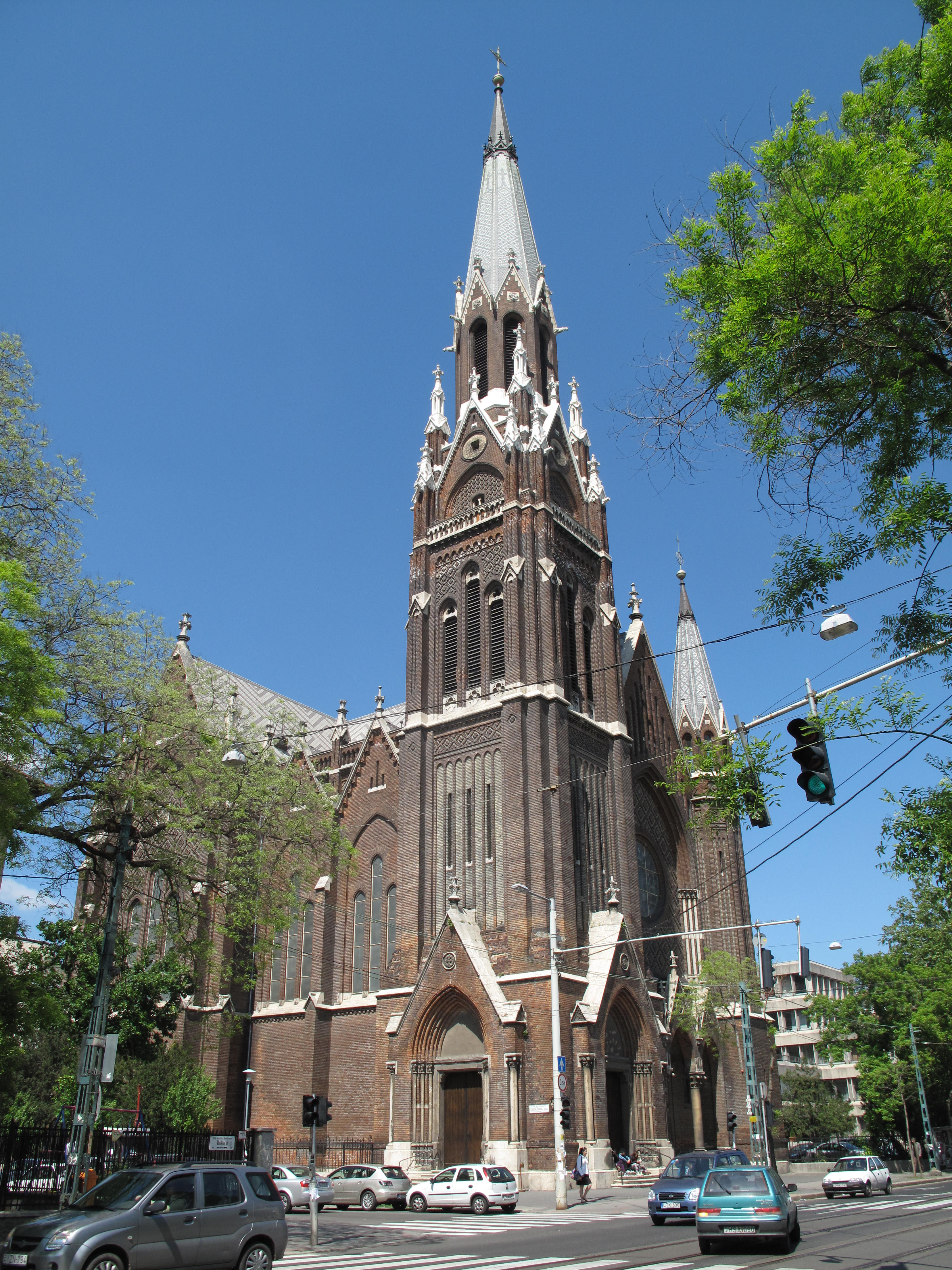 Budapešť, dominikánský kostel